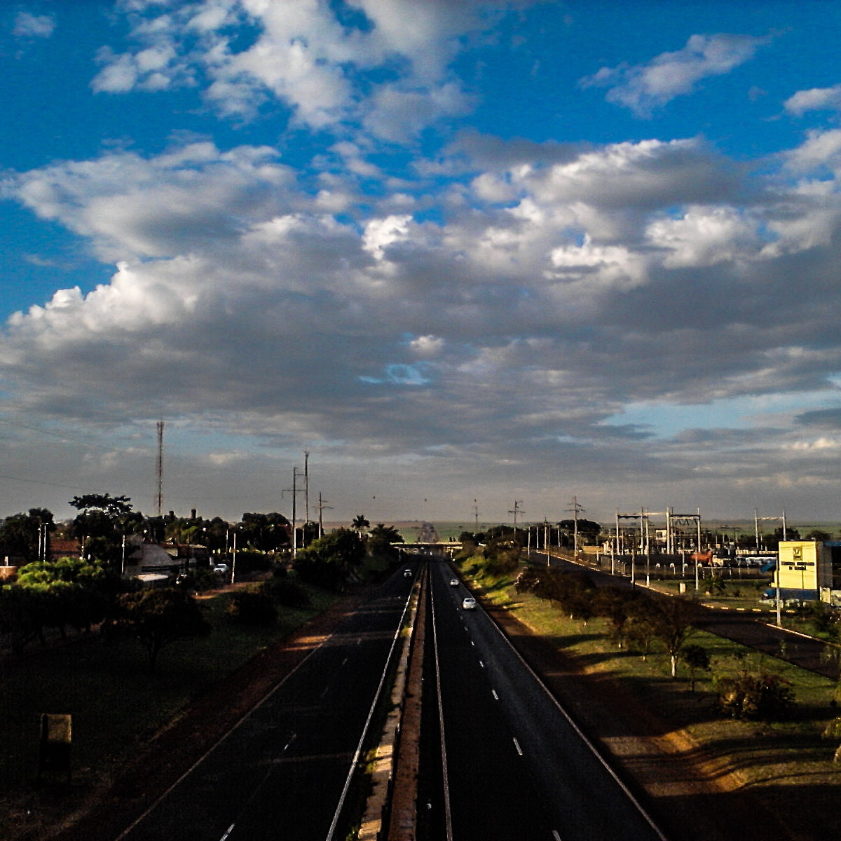 Vista parcial do município de Tarumã, no estado de São Paulo desde rodovia SP-333